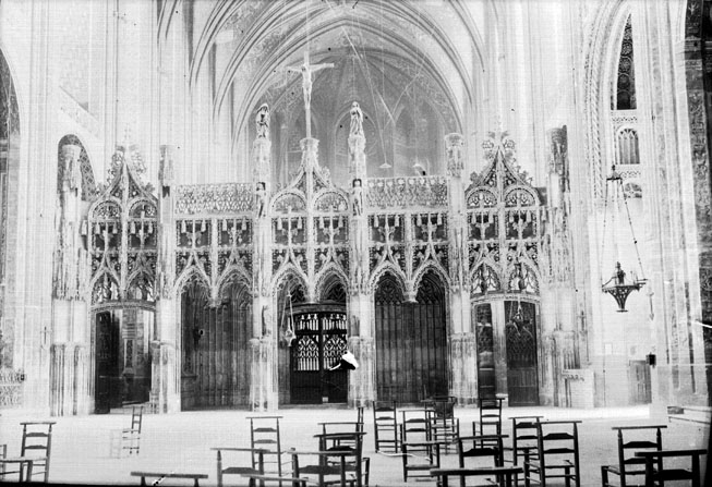 Fonds Trutat - Photographie ancienne Cote : TRU C 800 Localisation : Fonds ancien (S 30) Original non communicable Titre : Entrée du jubé de la cathédrale Sainte-Cécile, Albi, juillet 1899 Auteur : Trutat, Eugène Rôle de l’auteur : Photographe Lieu de création : Albi (Tarn) Date de création : 1899 Mesures : : 9 x 12 cm Observations : Notes de la main de E. Trutat : "obj. Goerz, pl. antihalo" Mot(s)-clé(s) : -- Cathédrale -- Jubé -- Arche -- Arcade -- Croix -- Statue -- Sculpture -- Colonne -- Grille -- Voûte -- Chandelier -- Chaise -- Nef -- Choeur -- Albi (Tarn) -- Albi (Tarn ; canton) -- Midi-Pyrénées (France) -- Cathédrale Sainte Cécile (Albi) -- 19e siècle, 4e quart -- 13e siècle -- 16e siècle Médium : Photographies -- Négatifs sur plaque de verre -- Noir et blanc -- Goerz -- Vues d'architecture Bibliothèque de Toulouse. Domaine public